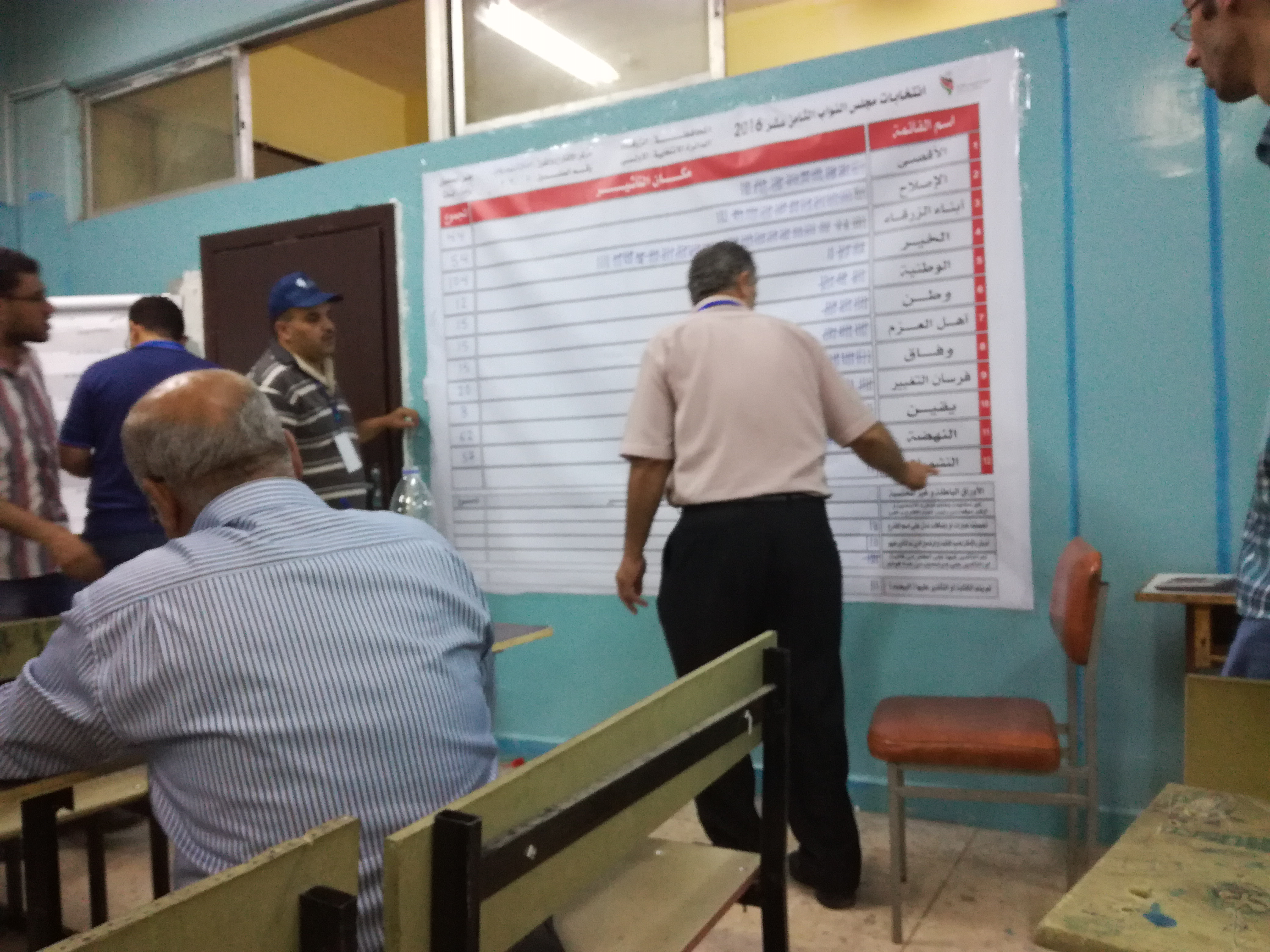 أثناء عملية الفرز لللإنتخابات النيابية الأردنية 2016 بمدرسة الشاملة في محافظة الزرقاء